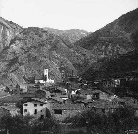 Imatge